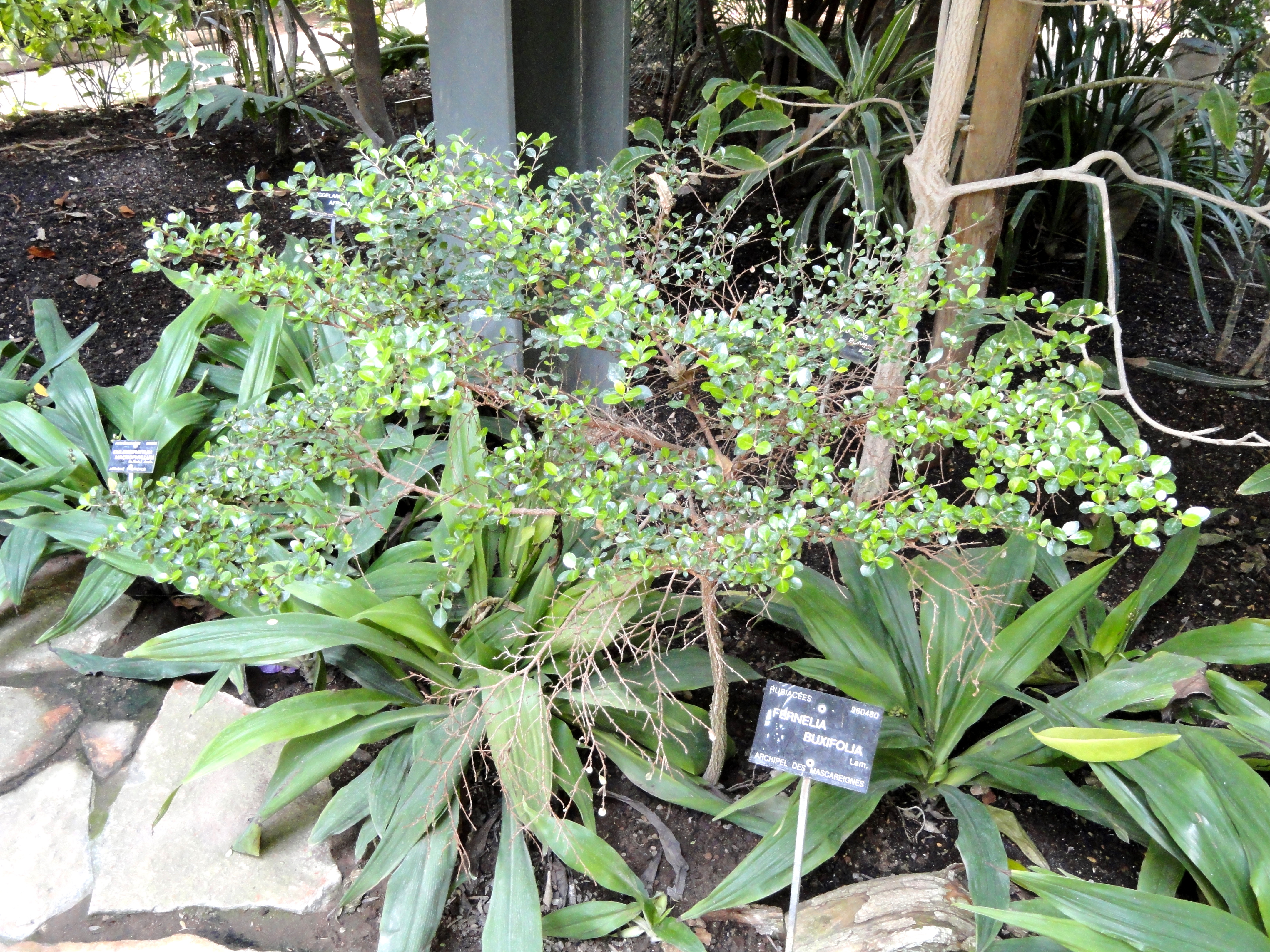 Fernelia buxifolia specimen in the Jardin Botanique de Lyon, Parc de la Tête d'Or, Lyon, France.